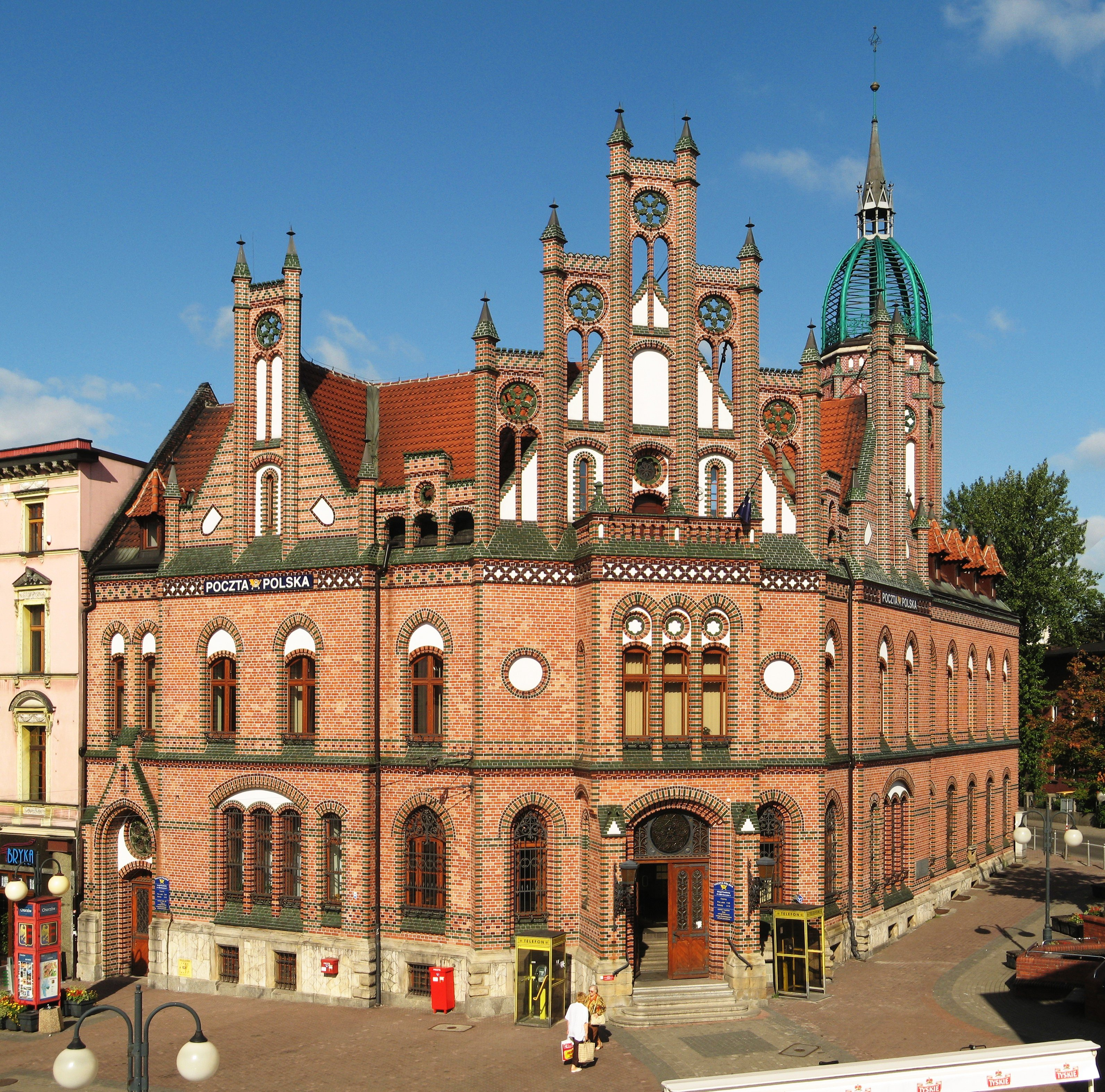 Chorzów (Königshütte), Gebäude der Post bzw. der ehemaligen Kaiserlichen Reichspost, (mit Hilfe des Programms Hugin aus 4 Einzelbildern zusammengesetzt)